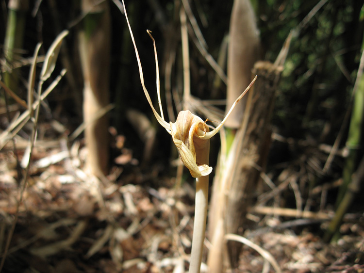 Arachnitis uniflora – flor de la araña